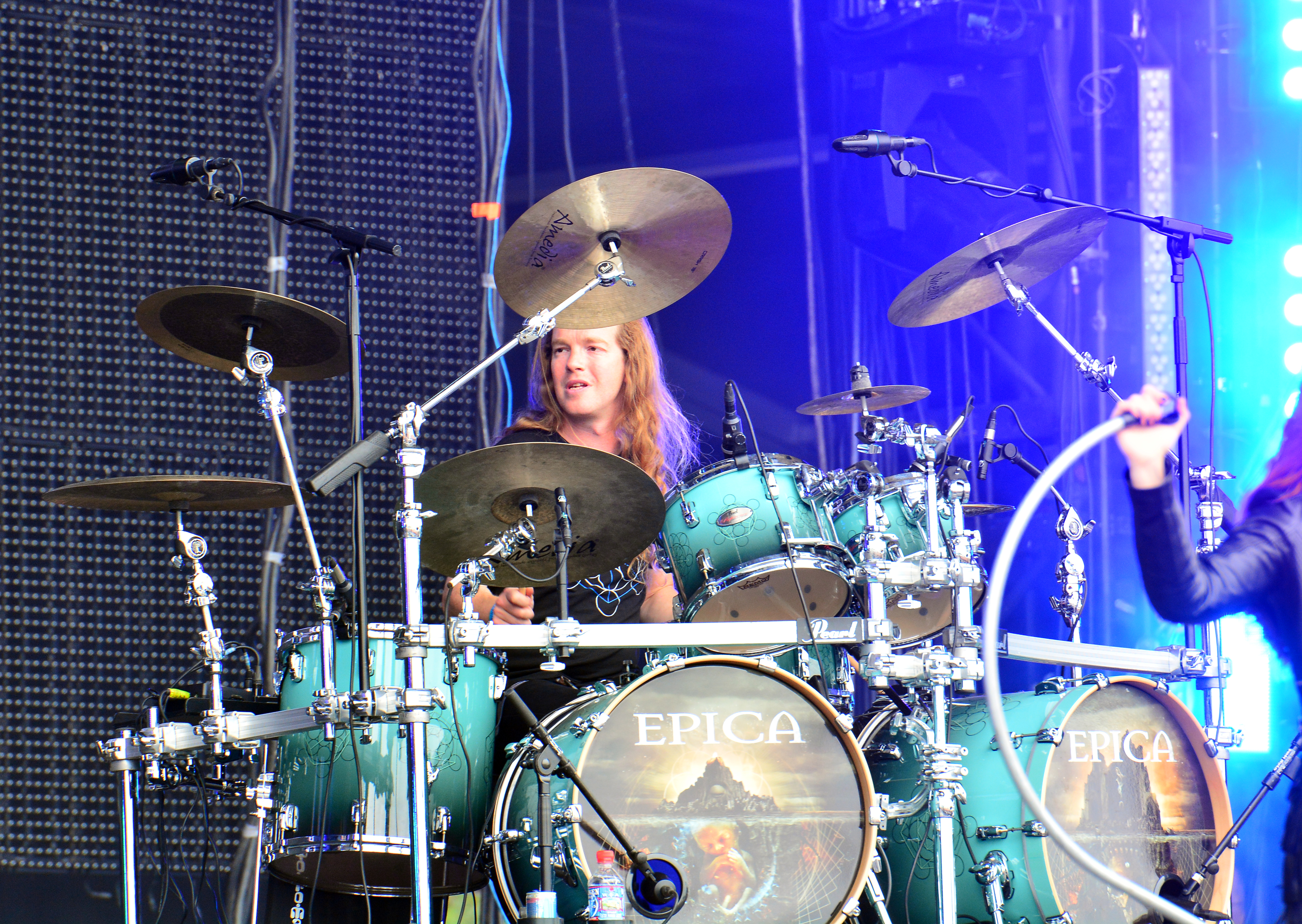 Epica beim Wacken Open Air 2015